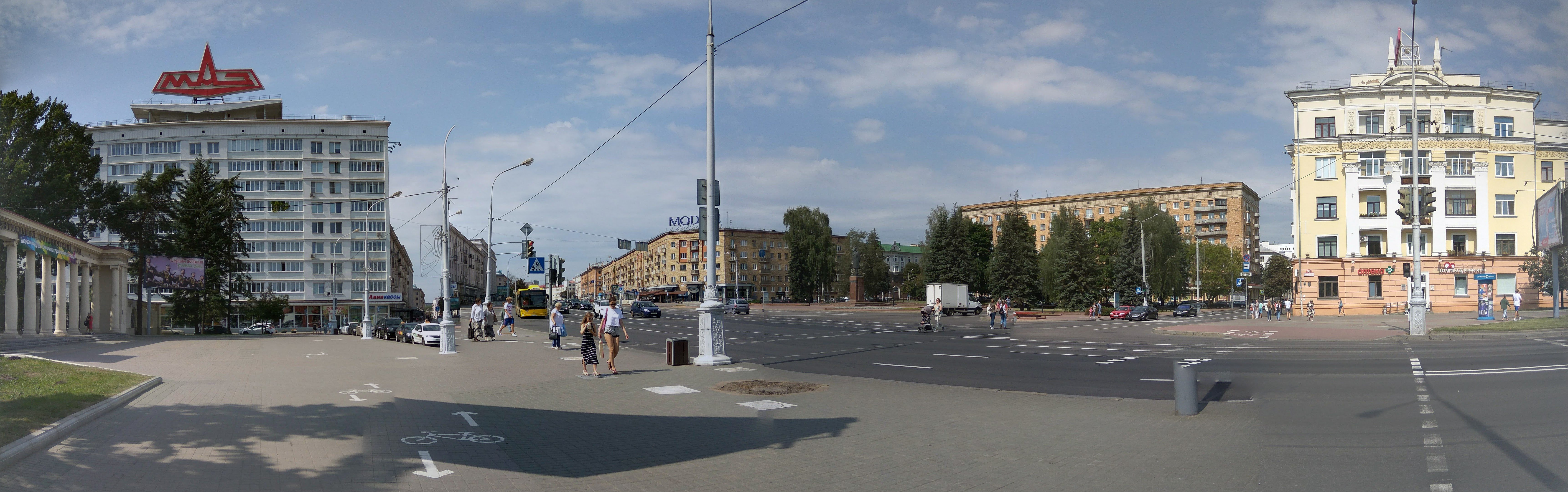 Мінск. Панарама плошчы Калініна